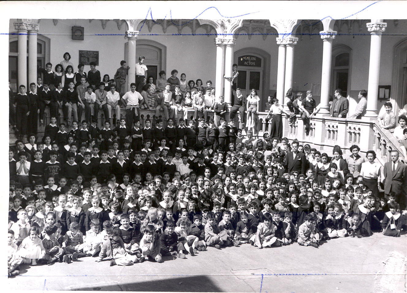 Fundación del Colegio Hebreo Monte Sinai, en Zacatecas 120, colonia Roma, actual sede de la Universidad de la Comunicación.